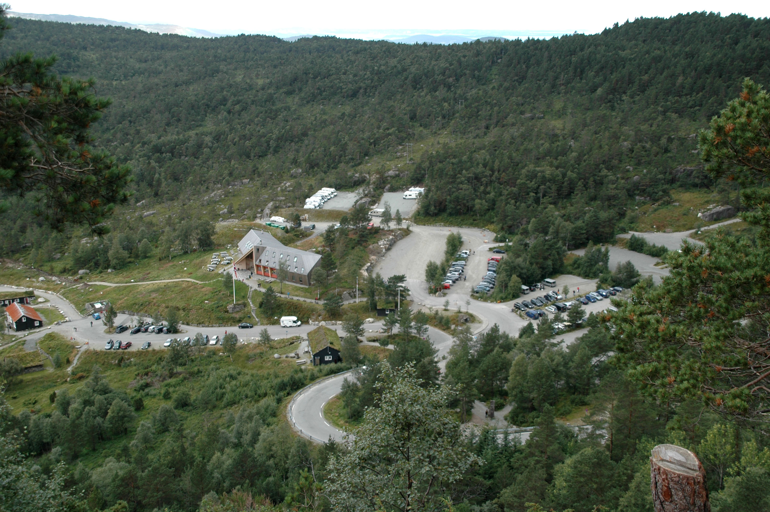 Preikestolen Fjellstue